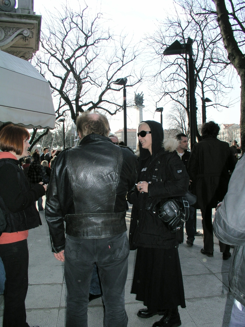 "Riječki novi val" ispred Konta u Rijeci, Pavica (Vim Cola) iz Parafa, Hrvatska